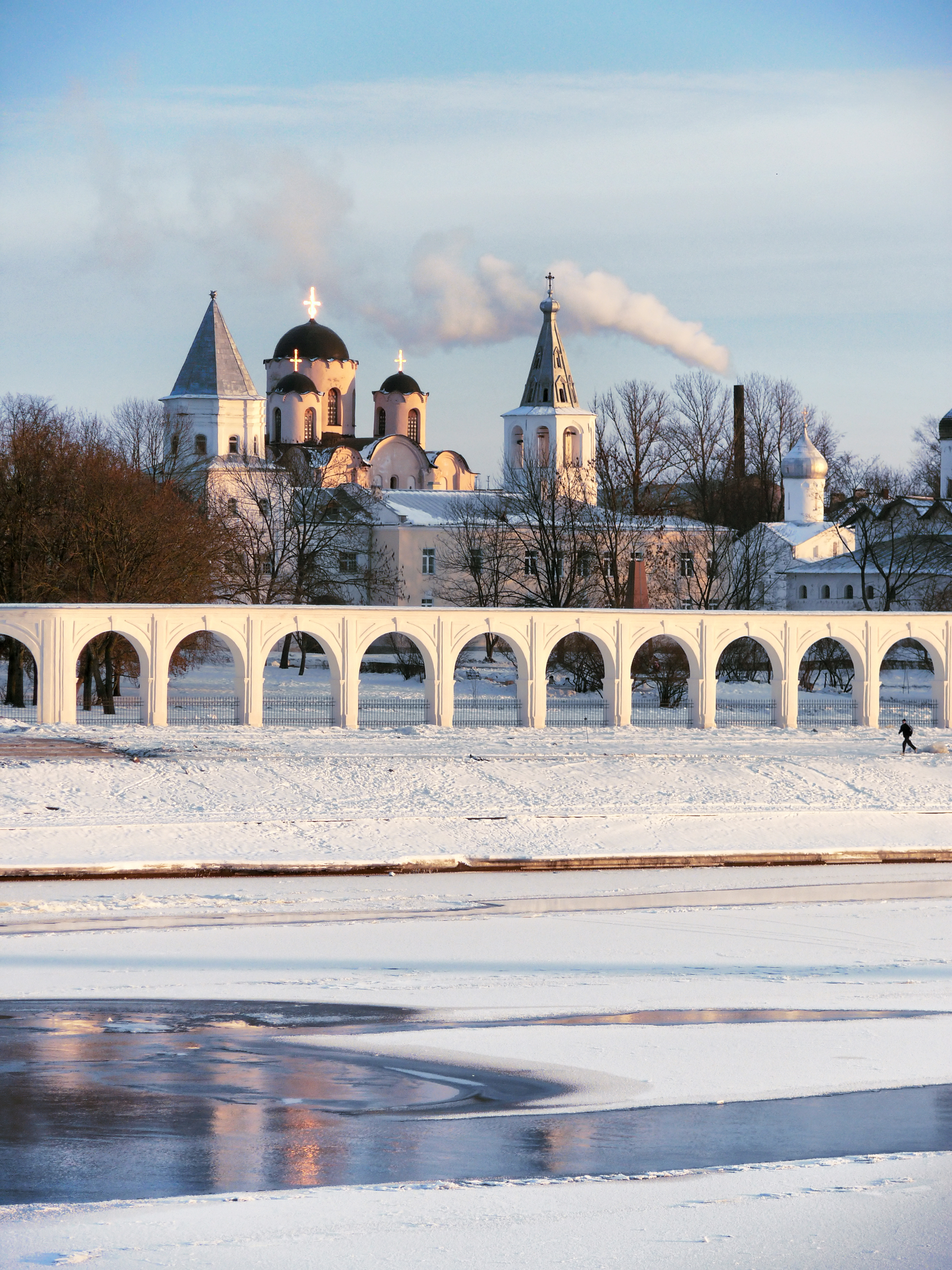 Ансамбль Ярославова Дворища и древнего Торга: Торговая сторона, улица Московская, Великий Новгород, Новгородская область